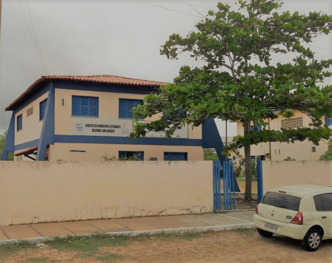 Biblioteca Municipal de Luis Correa, no litoral do Piauí.